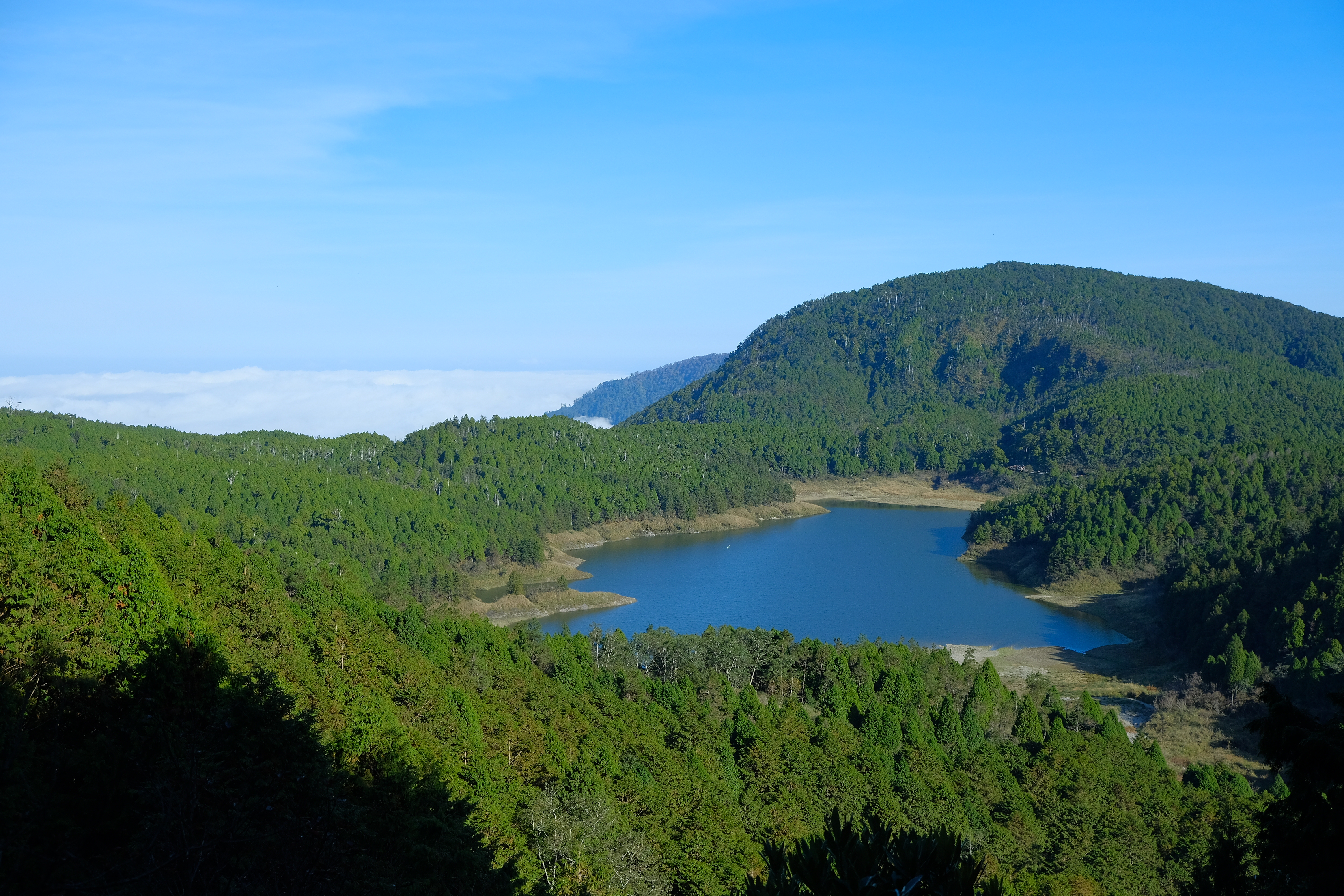 2019 Cueifong Lake (novembre) 翠峰湖